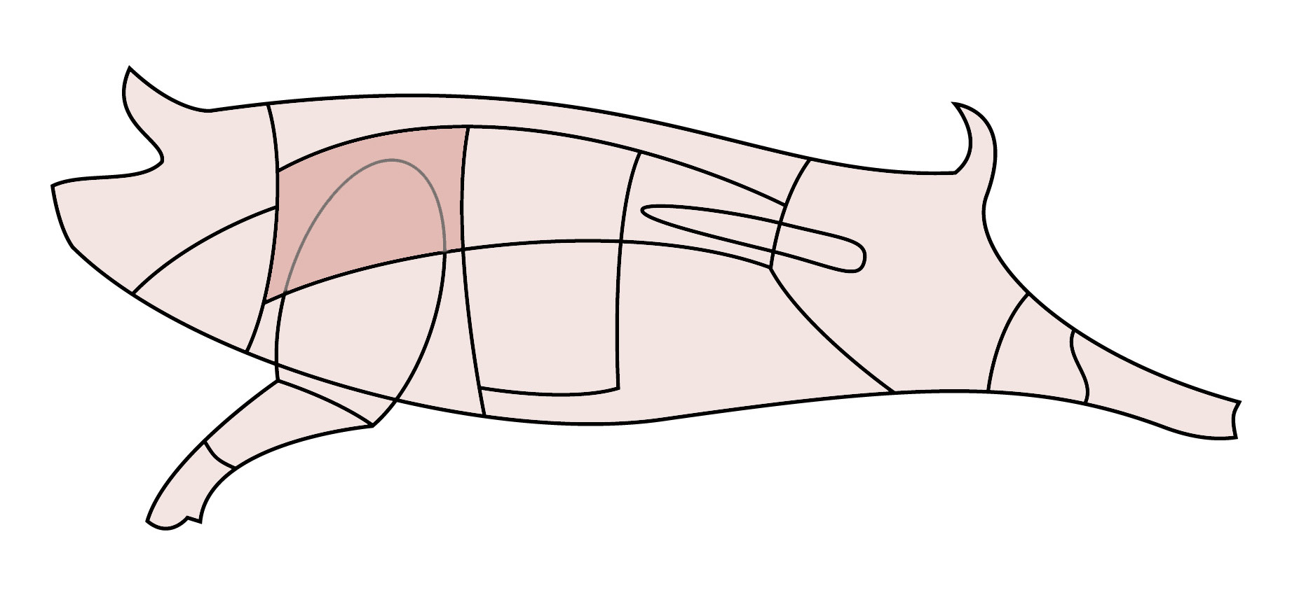 Schematische Darstellung eines Schweins, Schweinenacken.